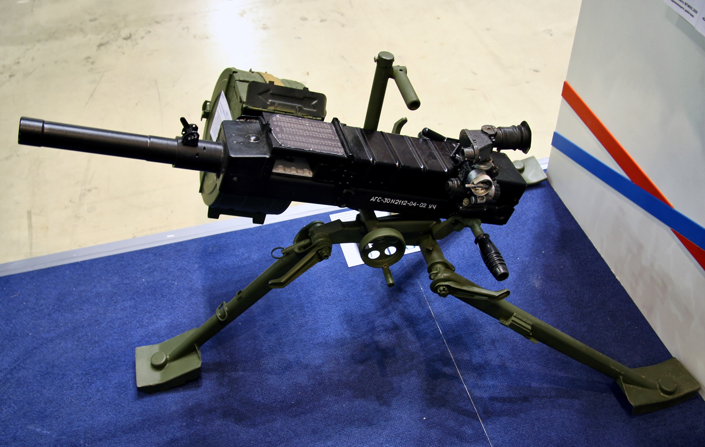 30-мм автоматический гранатомет АГС-30 (30mm AGS-30 grenade launcher)